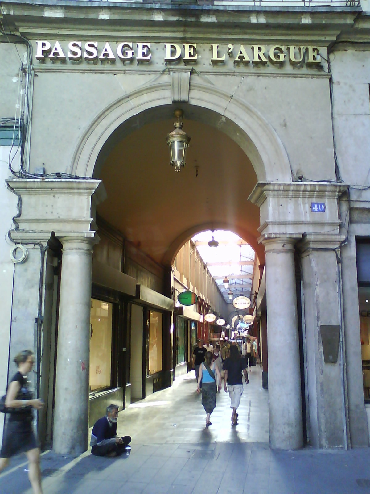 Passage de l'Argue, dans le 2° arrondissement, Lyon France